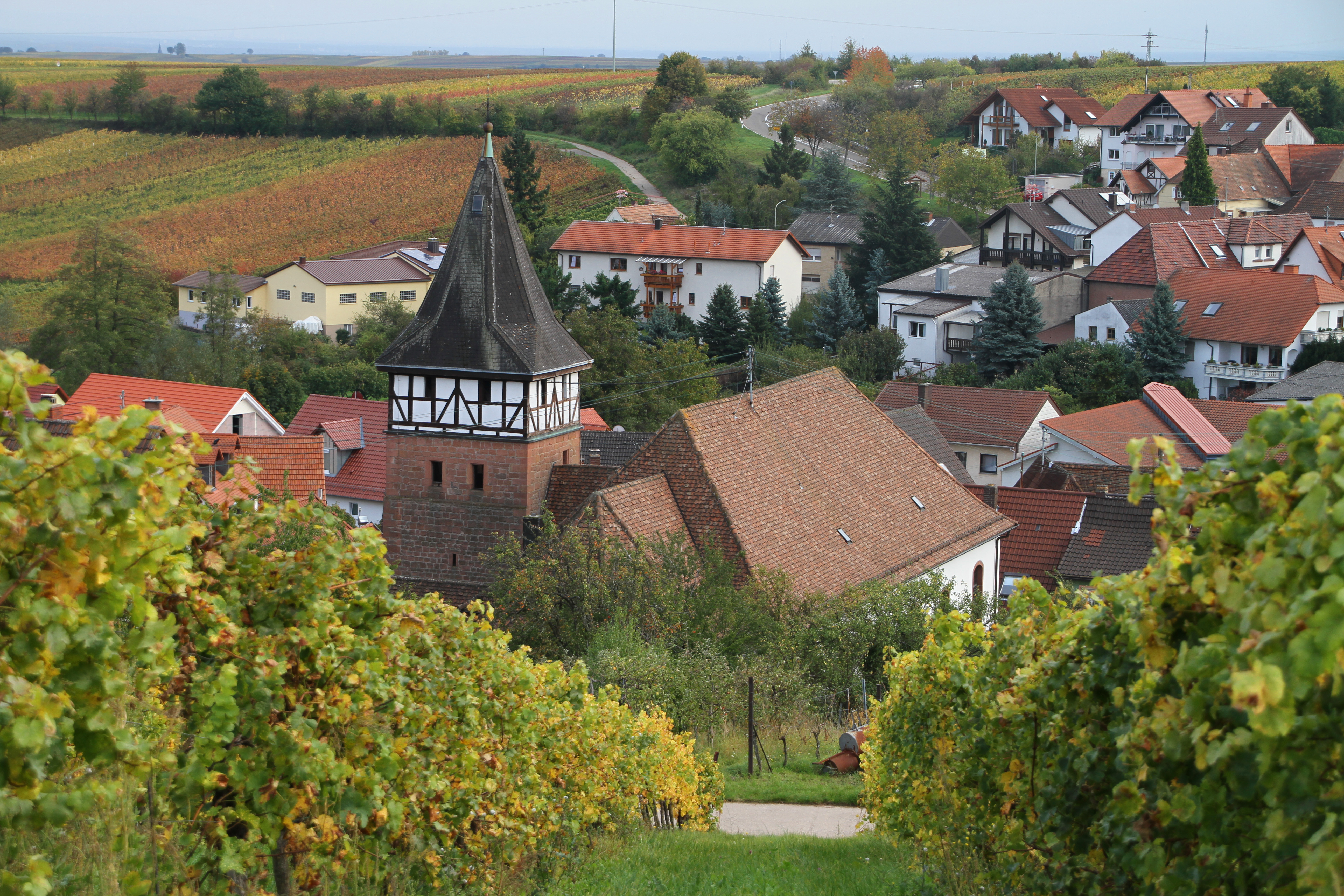 Ranschbach, Kirchgasse 9; Katholische Pfarr- und Wallfahrtskirche Allerheiligen; Saalbau unter Walmdach, 1782; spätgotischer ehemaliger Chorturm, teilweise Fachwerk, 15. Jahrhundert.